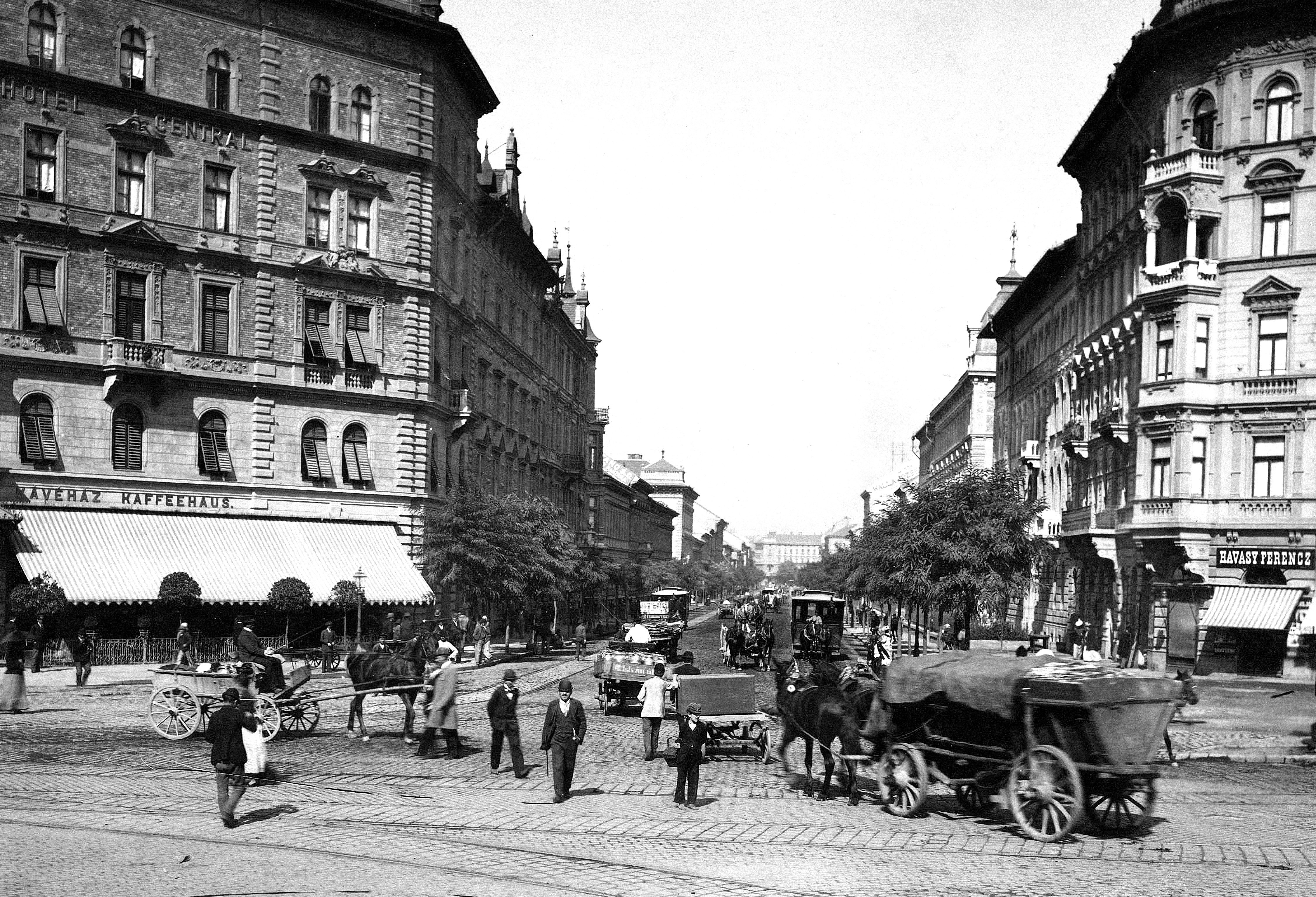 Klösz György felvétele a Rottenbiller utca és Baross tér kereszteződésében. A felvétel 1890 után készült." A kép forrását kérjük így adja meg: Fortepan / Budapest Főváros Levéltára. Levéltári jelzet: HU.BFL.XV.19.d.1.08.046